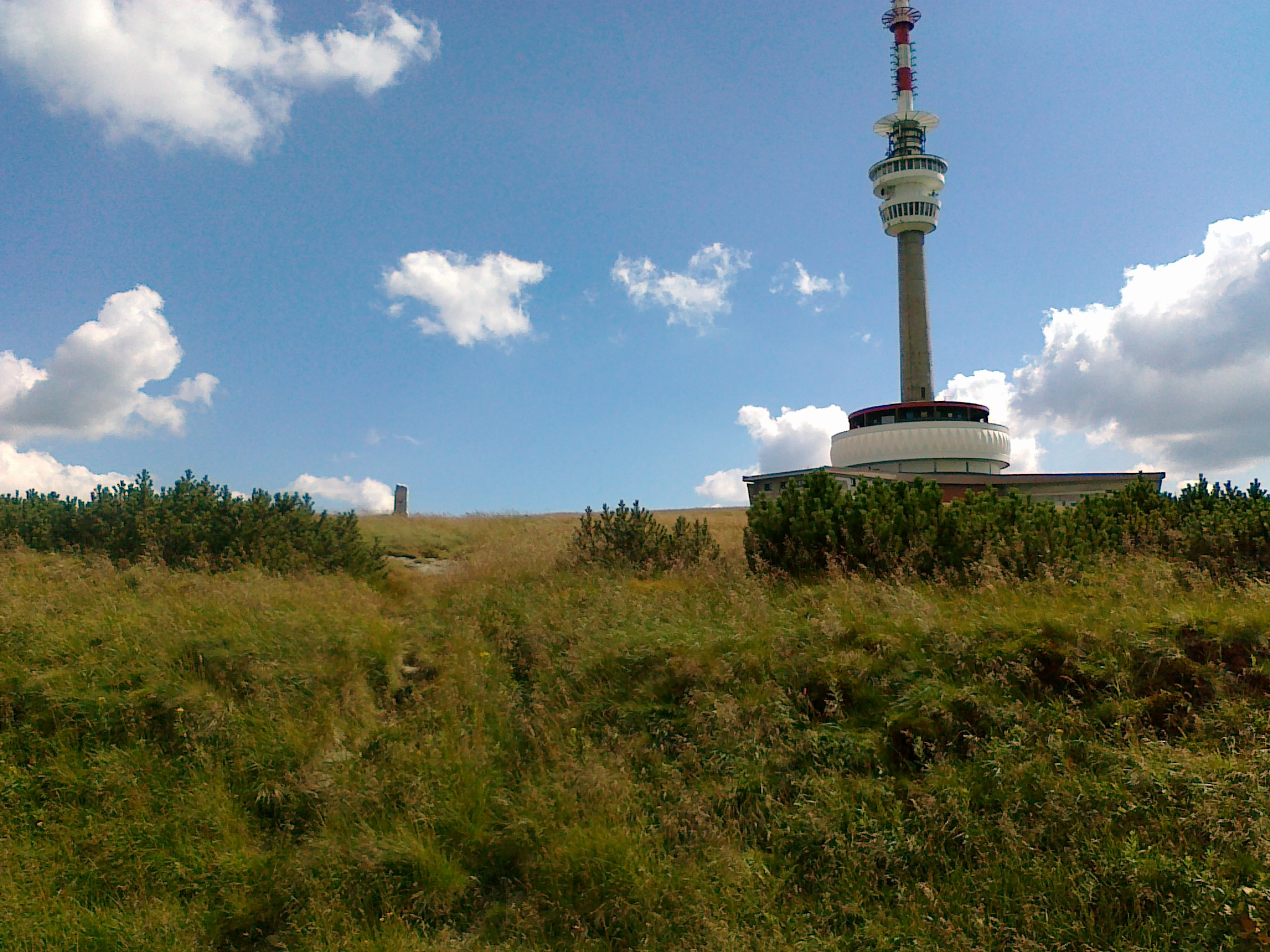 Widok na kamień graniczny i część wieży na górze Pradziad